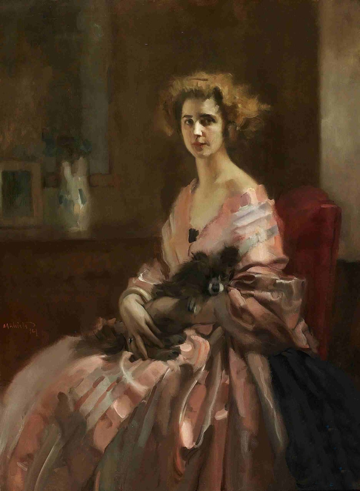 Dama in rosa